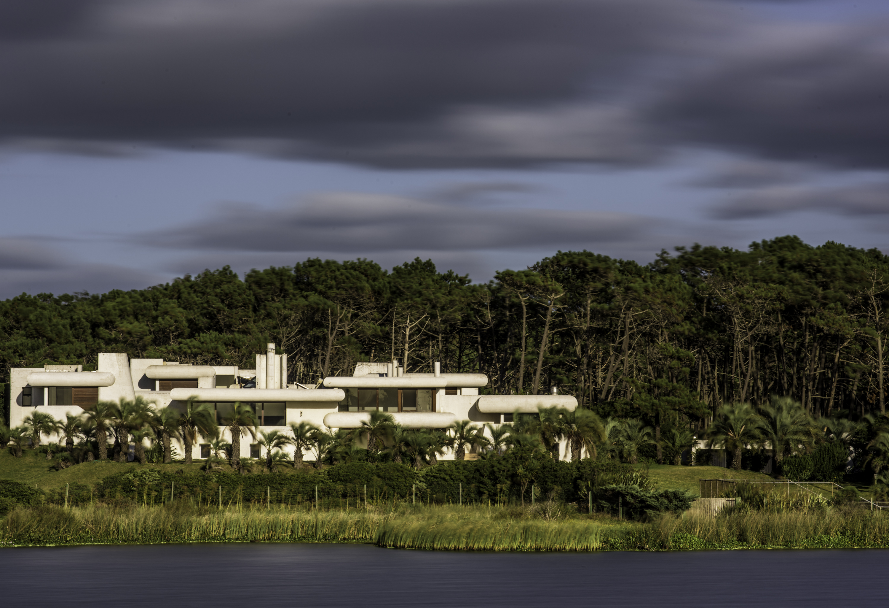 Casa Poseidón (Uruguay), junto a la laguna del Diario. Camera: NIKON D810 Lens: Zeiss Apo Sonnar T* 2/135 ZF.2 0 sec at f/22 ISO: 64